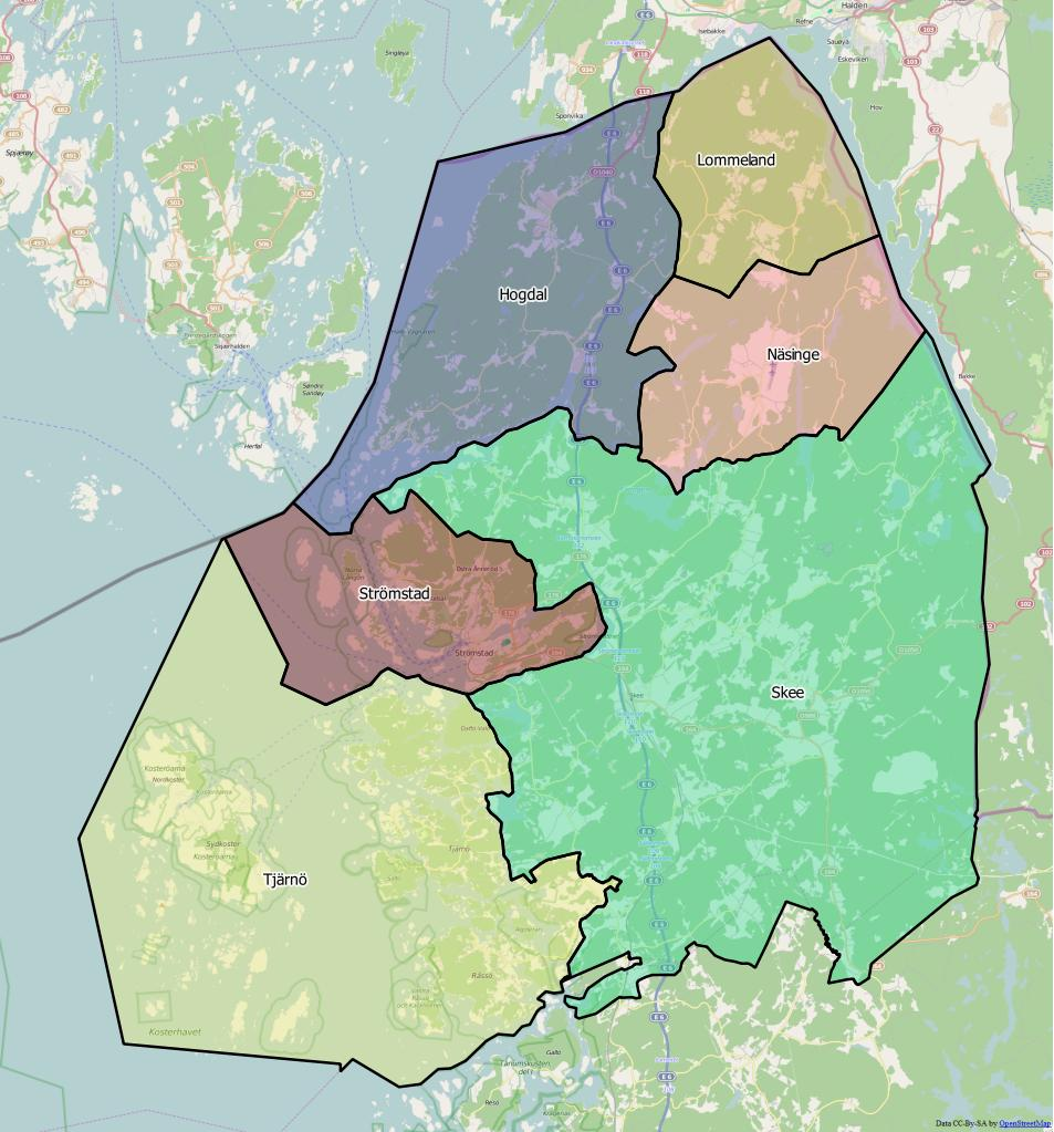 Distriktsindelningen i Strömstads kommun World file: 69.37545324095277977 0 0 -69.37545324095277977 1214102.99148202687501907 8207598.48701262567192316